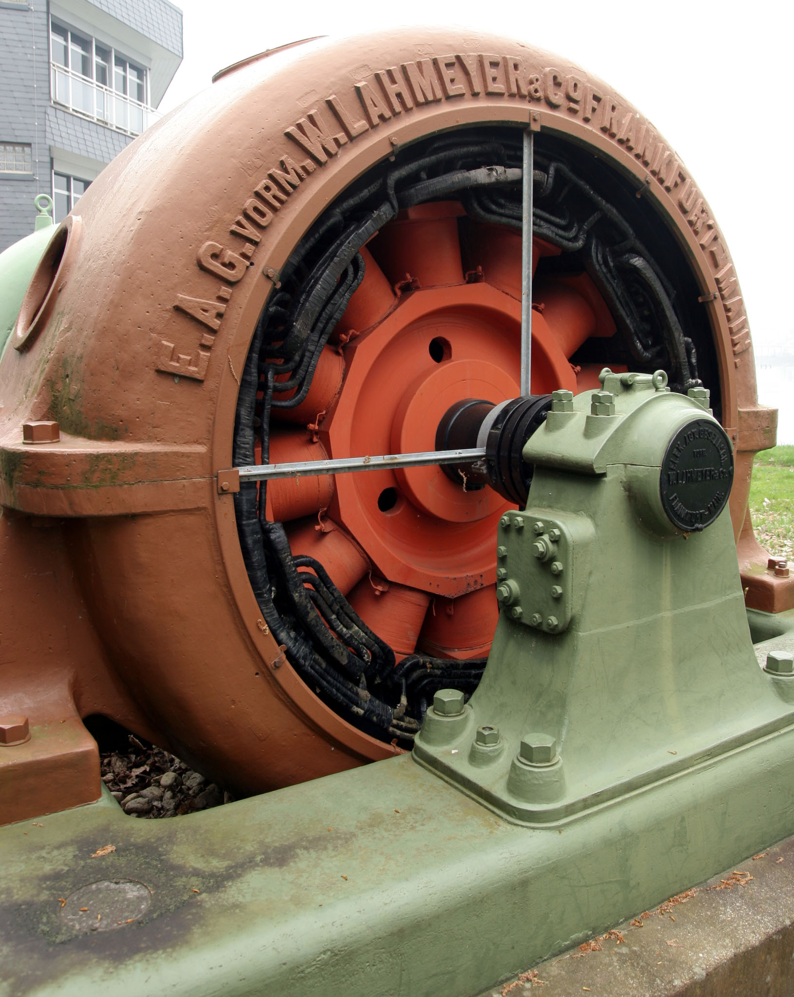 Industriedenkmal am Moselkraftwerk Fankel, bestehend aus einem Turbinen-Generatorensatz, der aus dem Wasserkraftwerk Heimbach in der Eifel stammt.